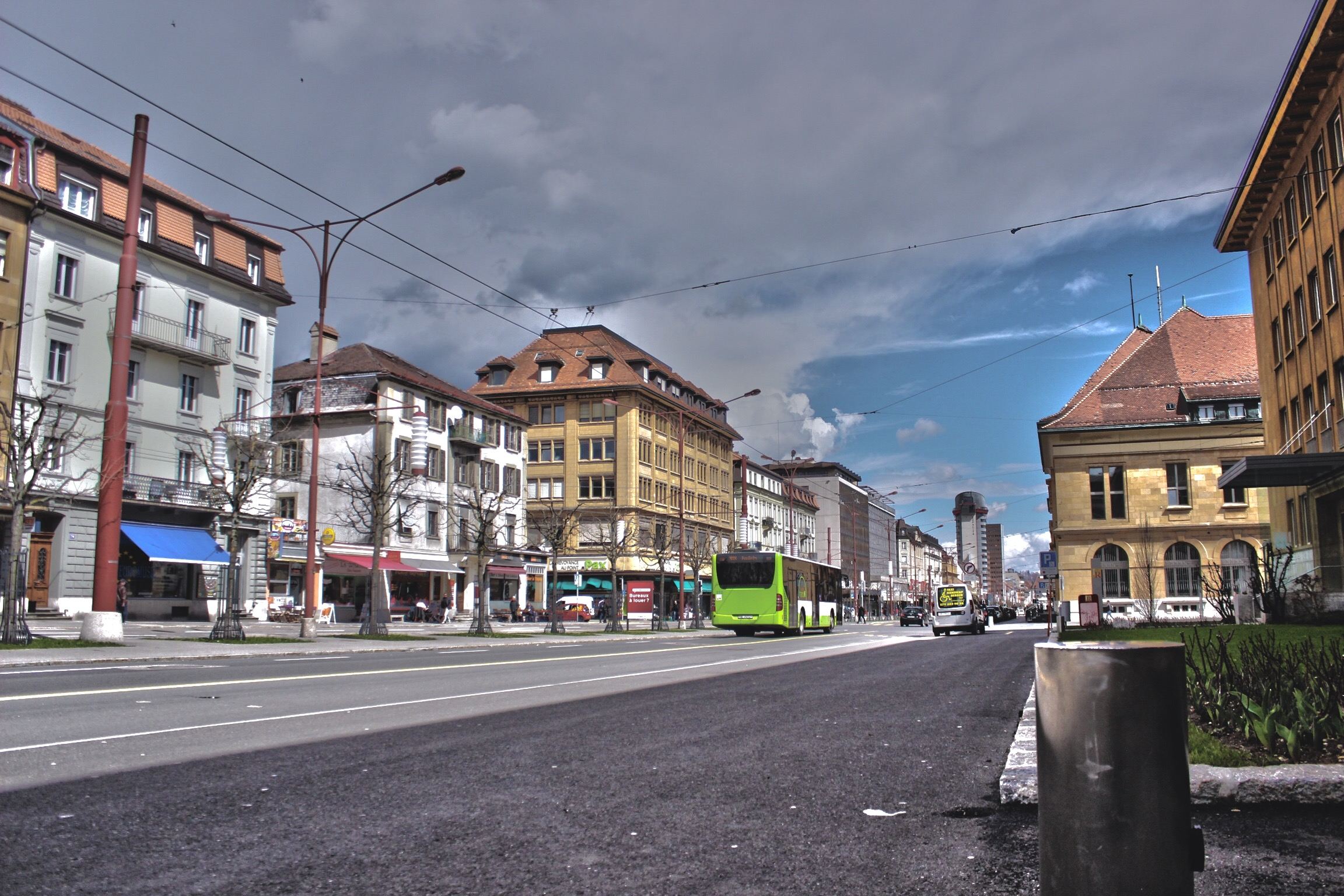 Gare La Chaux de Fonds